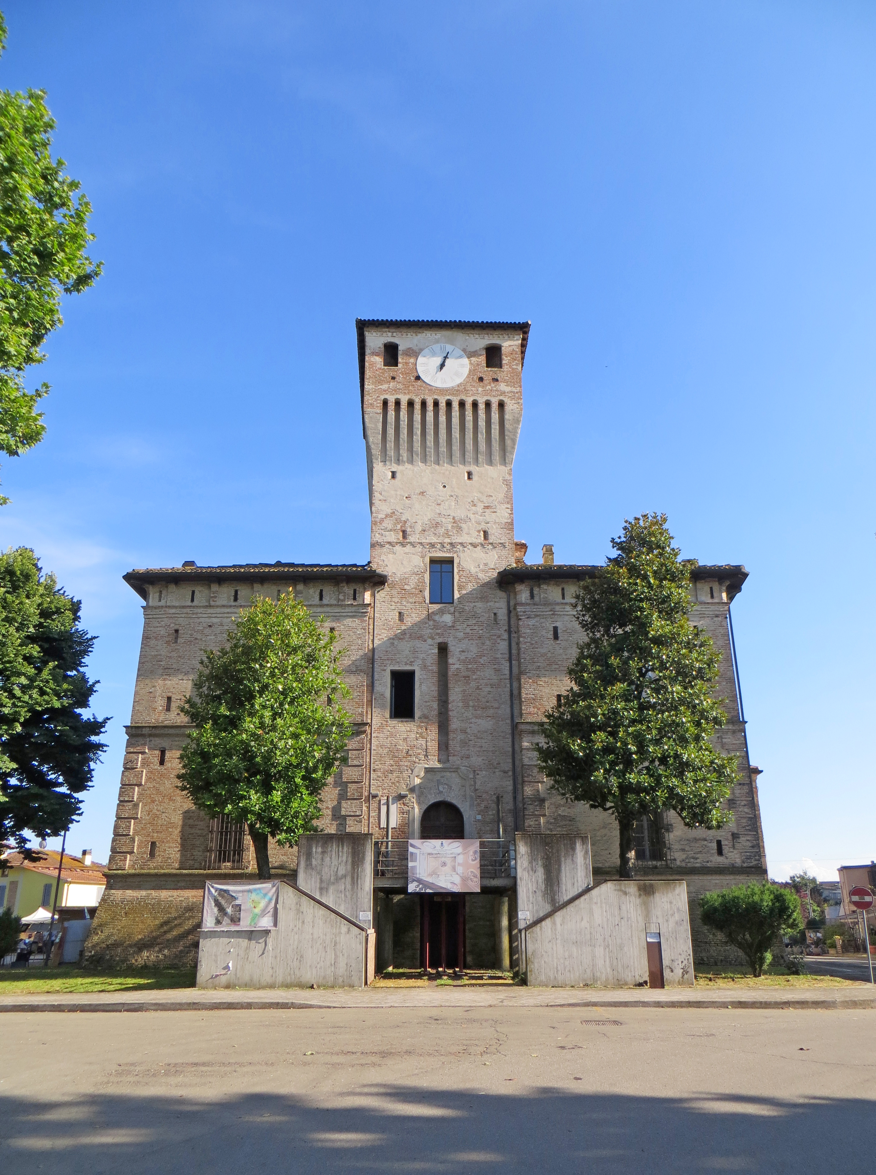 Rocca dei Terzi (Sissa) - facciata